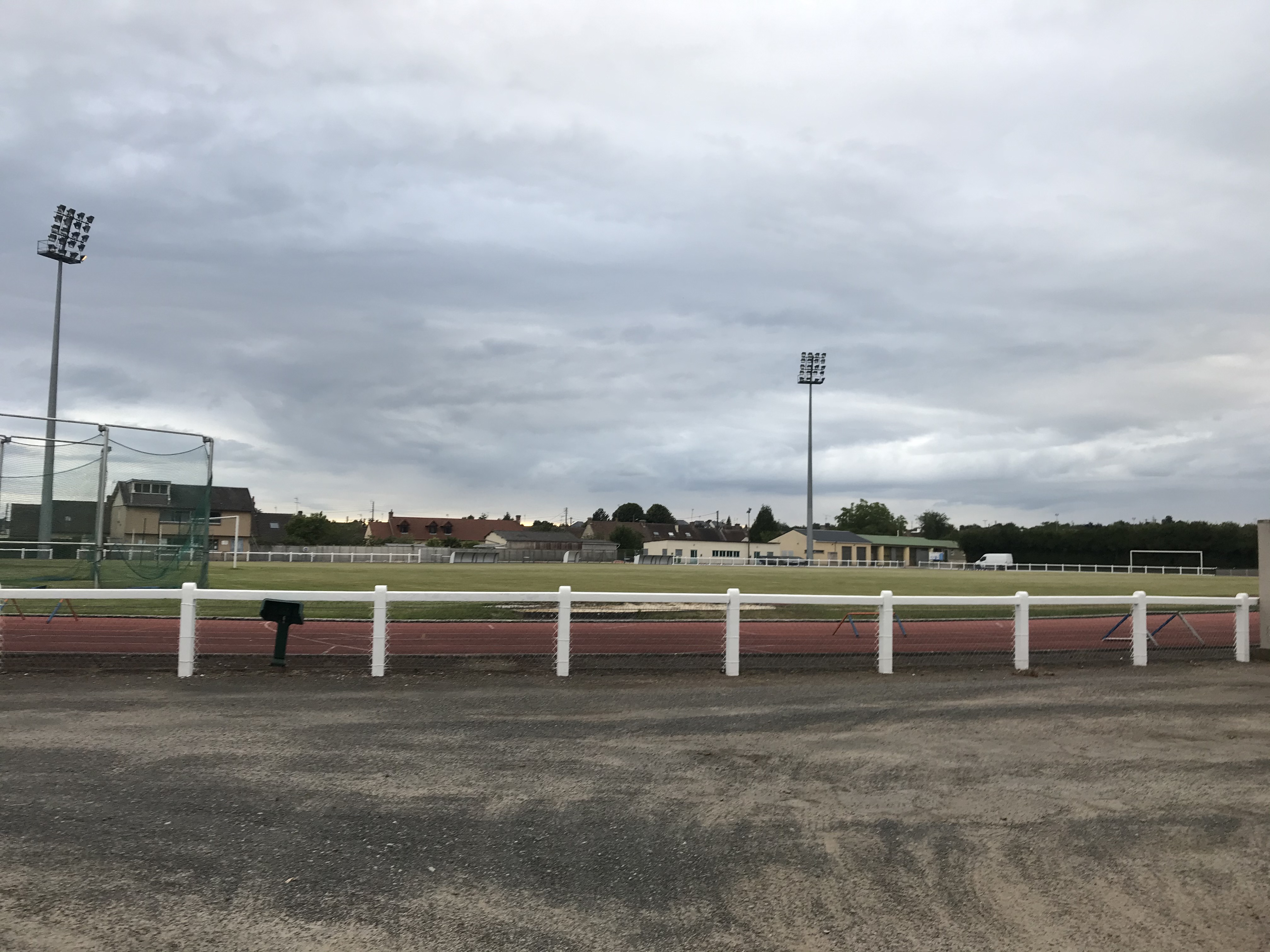 stade à Argentan